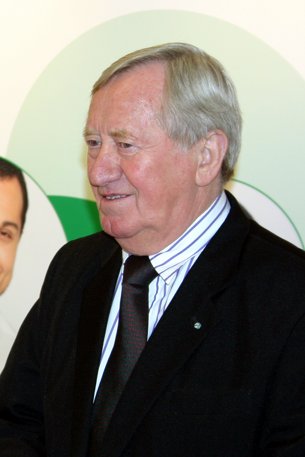 Johann Baptist (genannt Hans) Zehetmair, deutscher Politiker (CSU), derzeit (2011) Vorsitzender der Hanns-Seidel-Stiftung